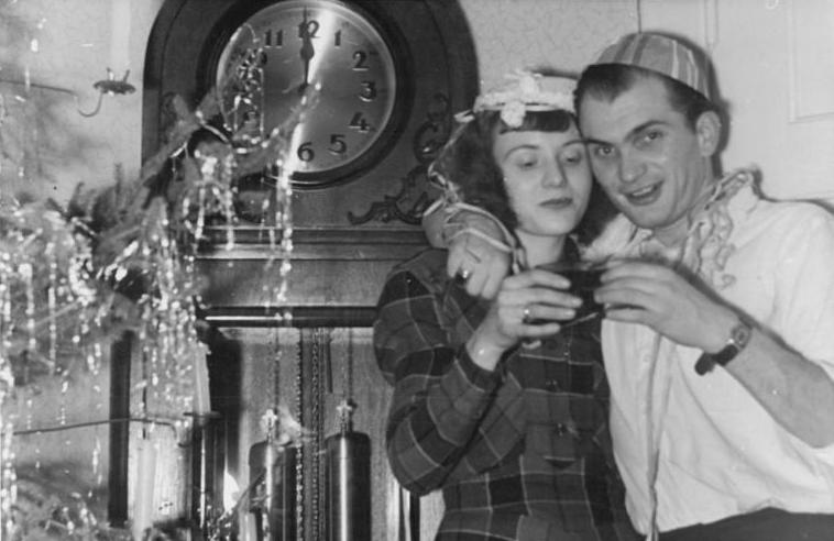 Neujahrsfest Sylvester 1949-1950 in Berlin. Aufn. Illus Quaschinsky 4968-50 Mlk 11.1.50